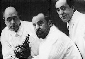 Pedro Mayoral Carpintero, en el centro, con dos colaboradores.